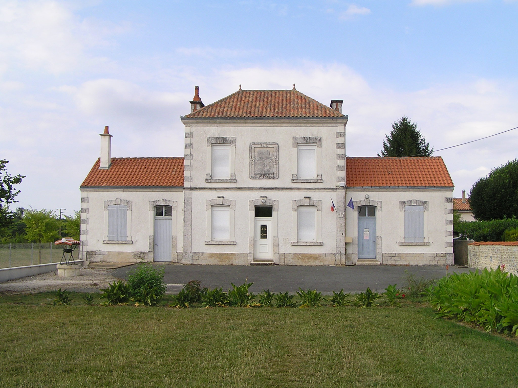 mairie de La Chèvrerie